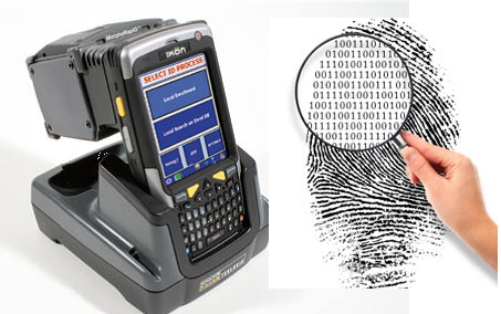 Lector de Huellas